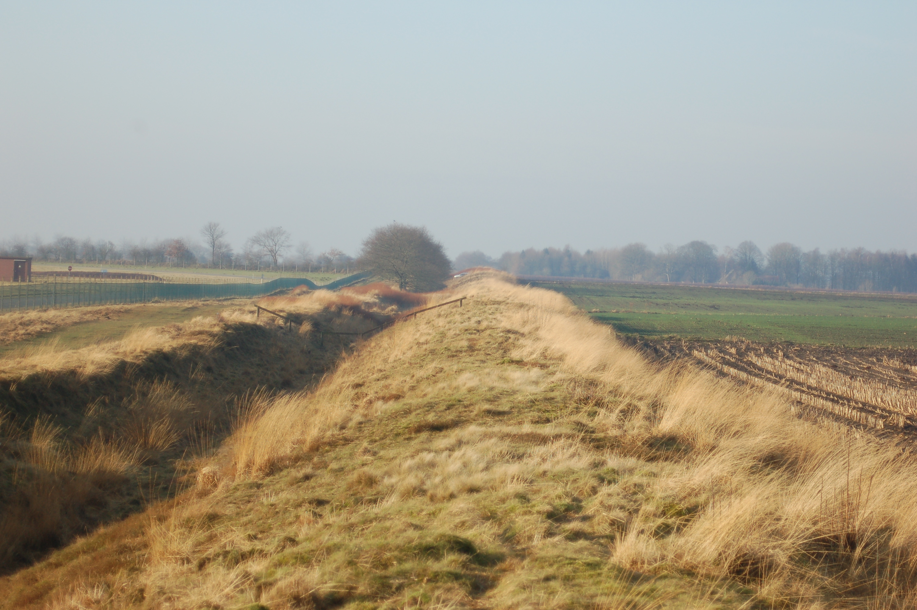 Der Kograben (dänisch: Kovirke) ist ein südlich gelegener Teil des Danewerkes. Er diente als Landwehr und Begrenzung zwischen Dänemark und Schleswig. Bau ca. um 800 n.Chr.